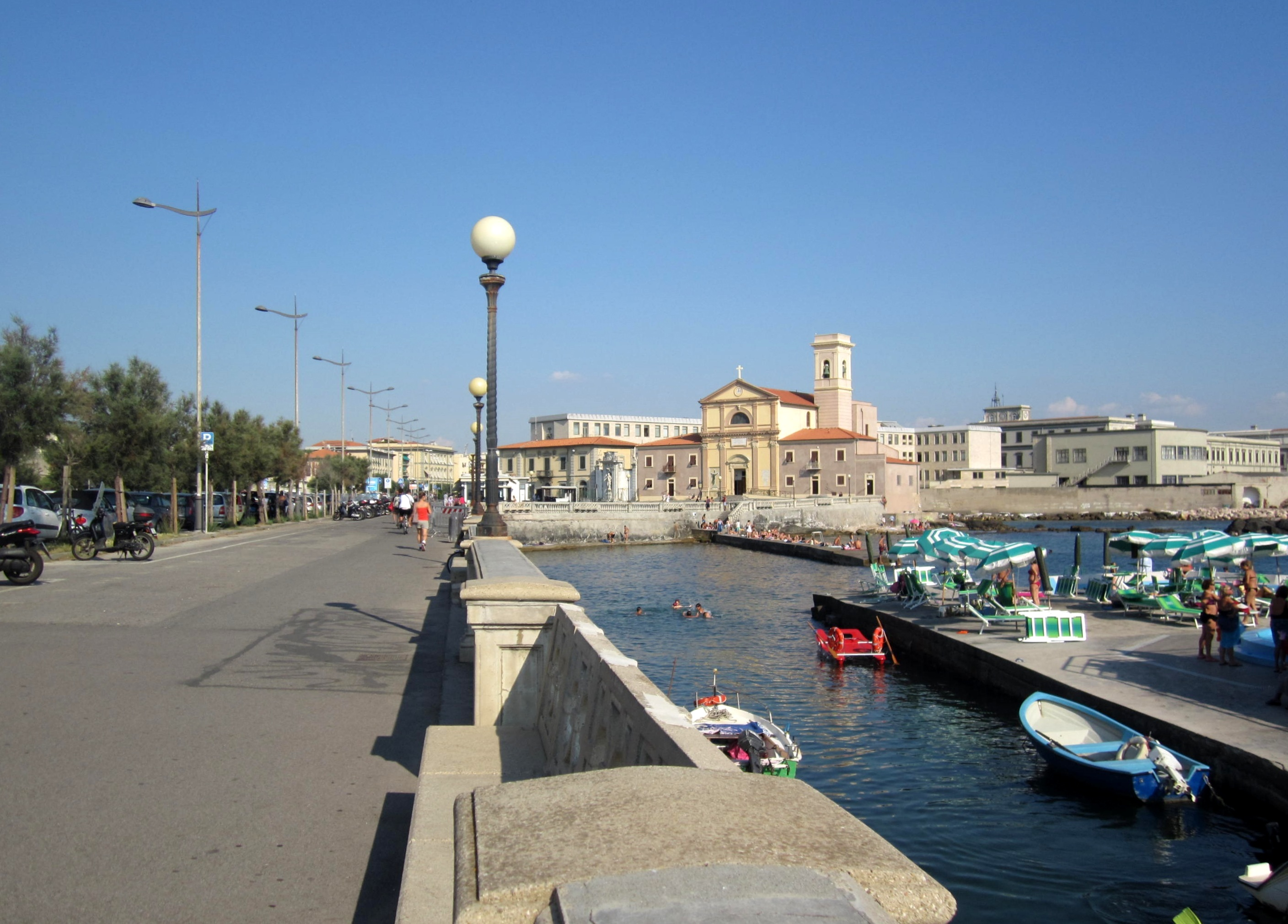 Lungomare di Livorno presso la Chiesa di san Jacopo